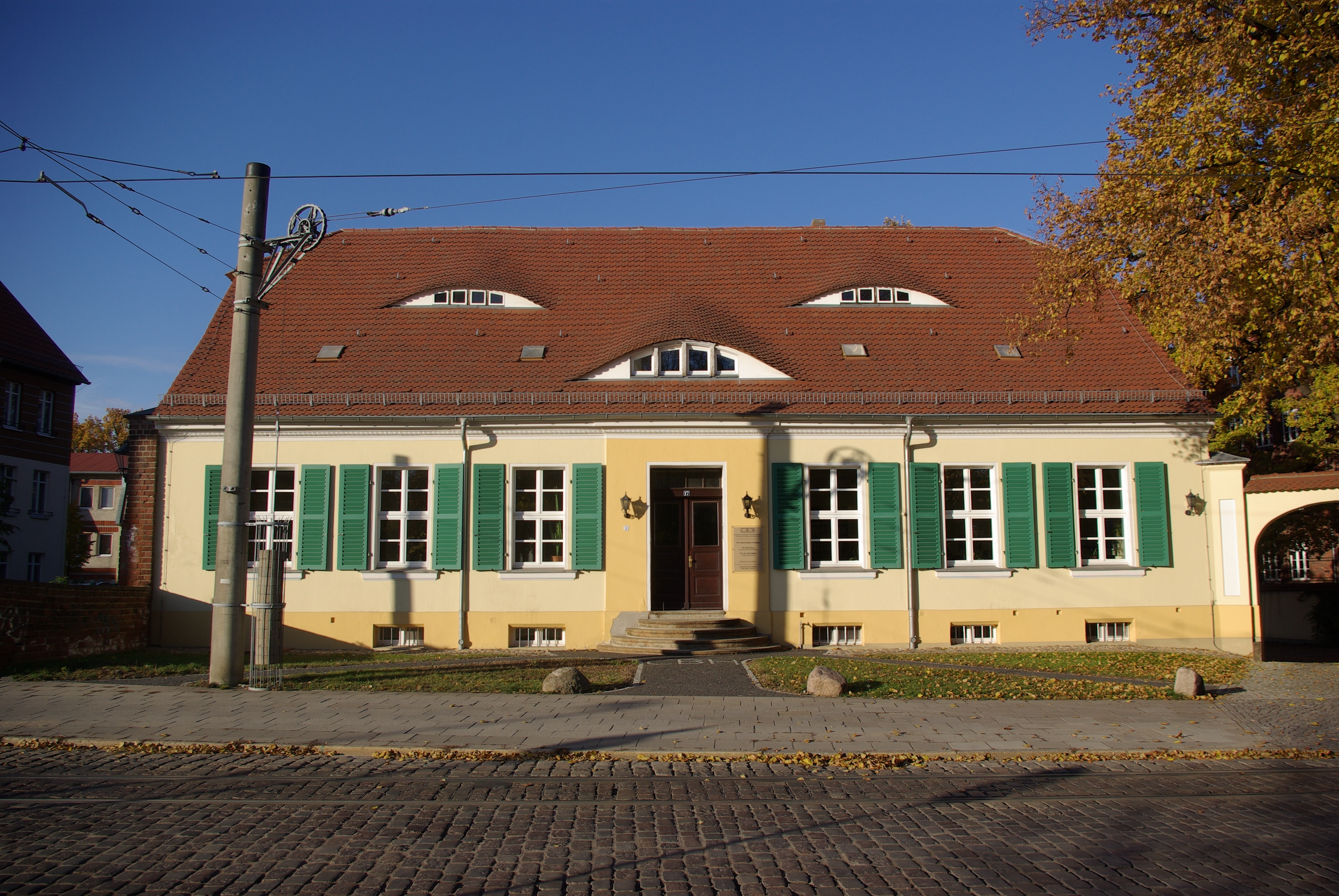 Cottbus in Brandenburg. Das Haus in der Sandower Straße 17 steht unter Denkmalschutz.